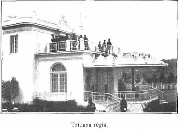 1916 hipodromoa errege tribuna